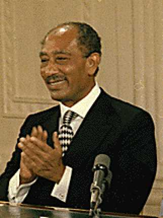 Anwar as-Sadat in Camp David